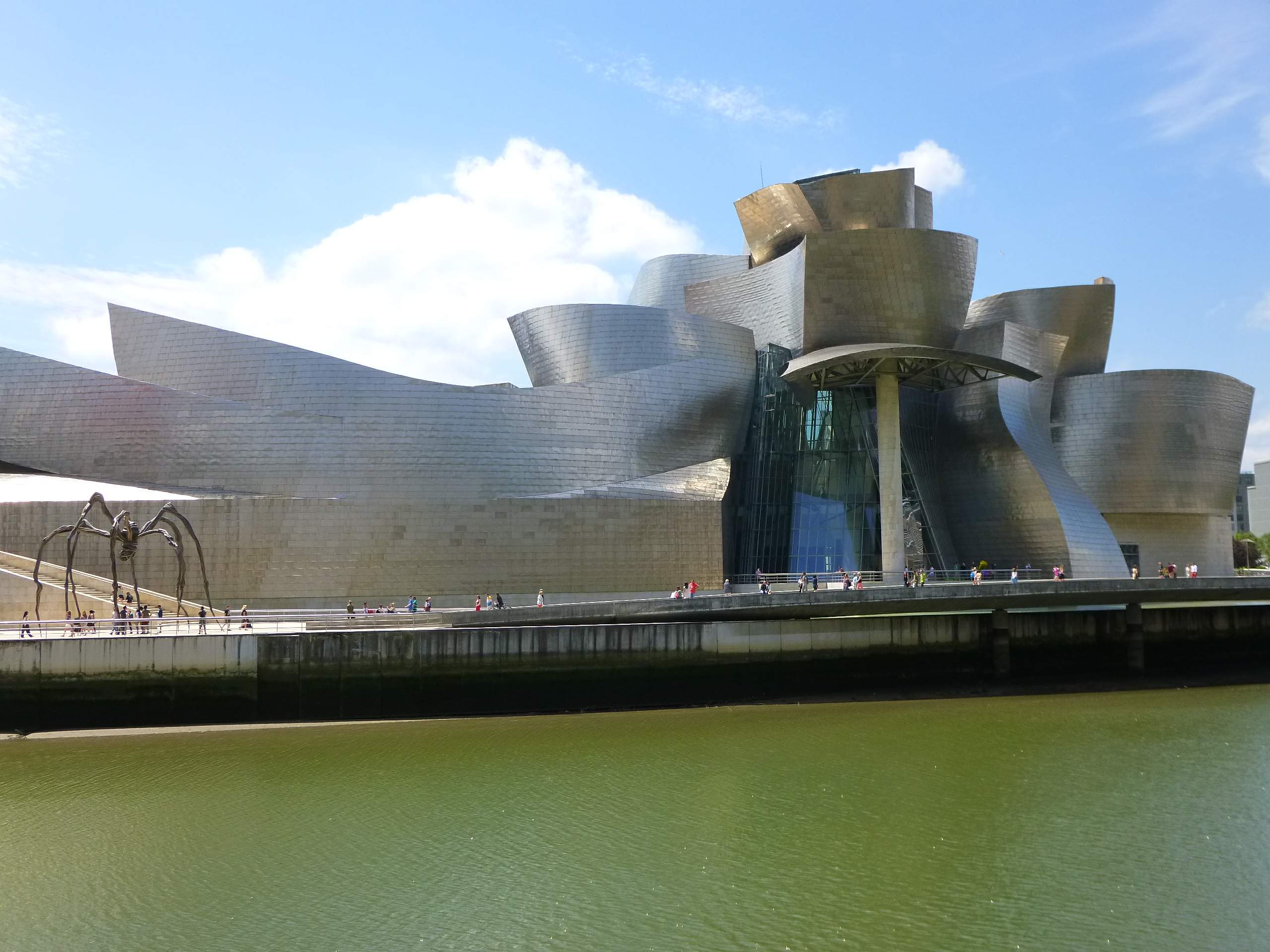 Museo Guggenheim Bilbao